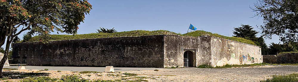 La Redoute de Rivedoux Plage construite par Vauban - Île de Ré - Charente Maritime - France